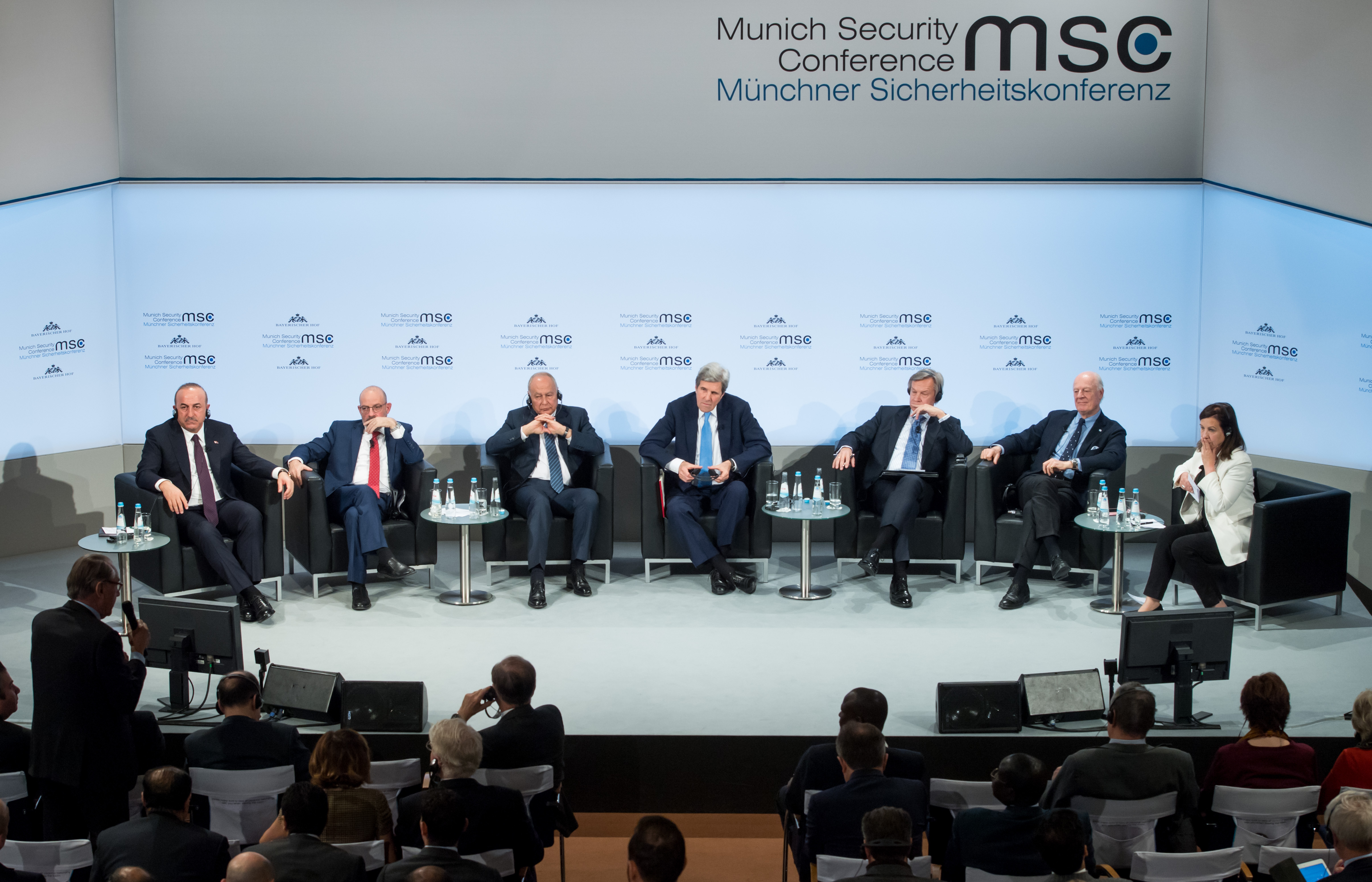 Mevlüt Cavusoglu, Yacoub Riad Sarraf, Ahmed Aboul-Gheit, John F. Kerry, Aleksey Pushkov, Staffan de Mistura und Lyse Doucet während der Münchener Sicherheitskonferenz 2018